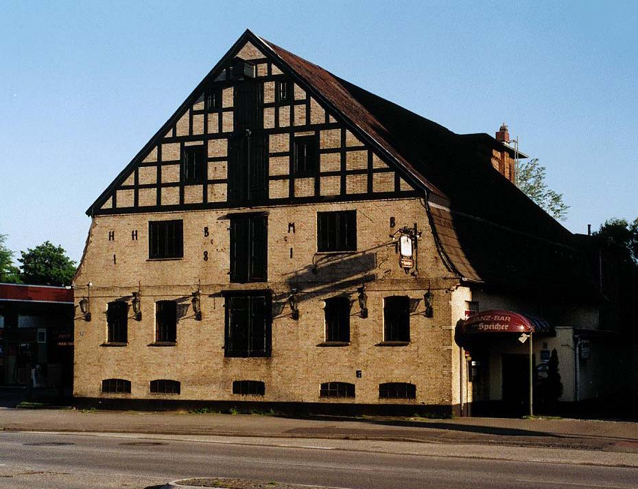 Elmshorn, Reichenstr. 10, ehemaliges Speicherhaus, Baujahr: 1817, Foto: 1999. Das Objekt war vor 2015 Kulturdenkmal.